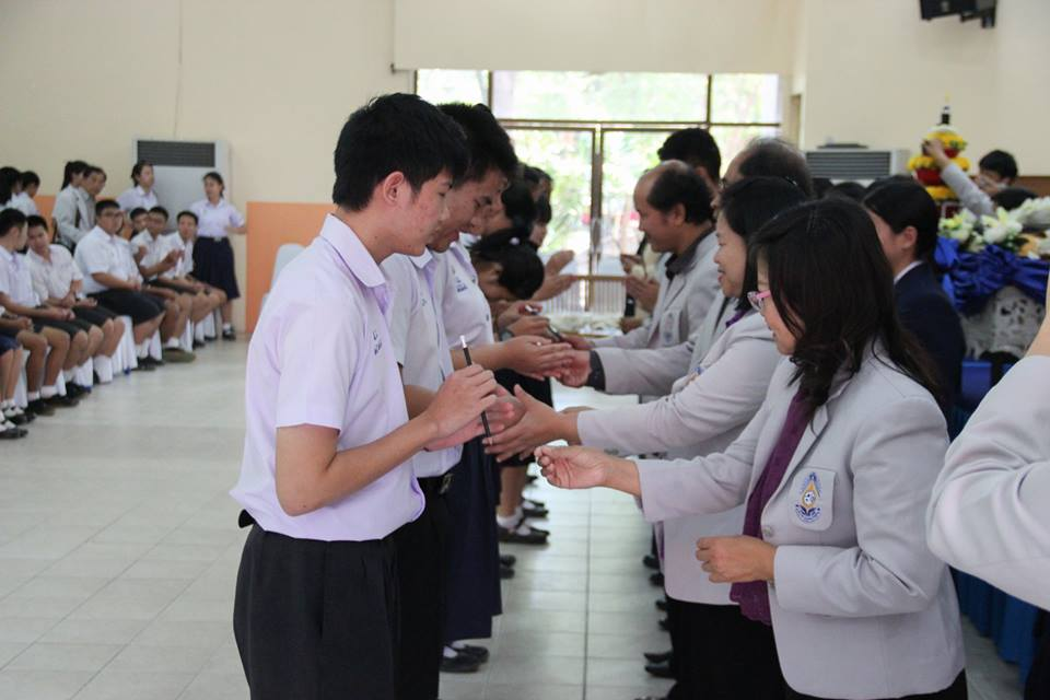 งานวันพร ปีการศึกษา 2560 ส.ว.